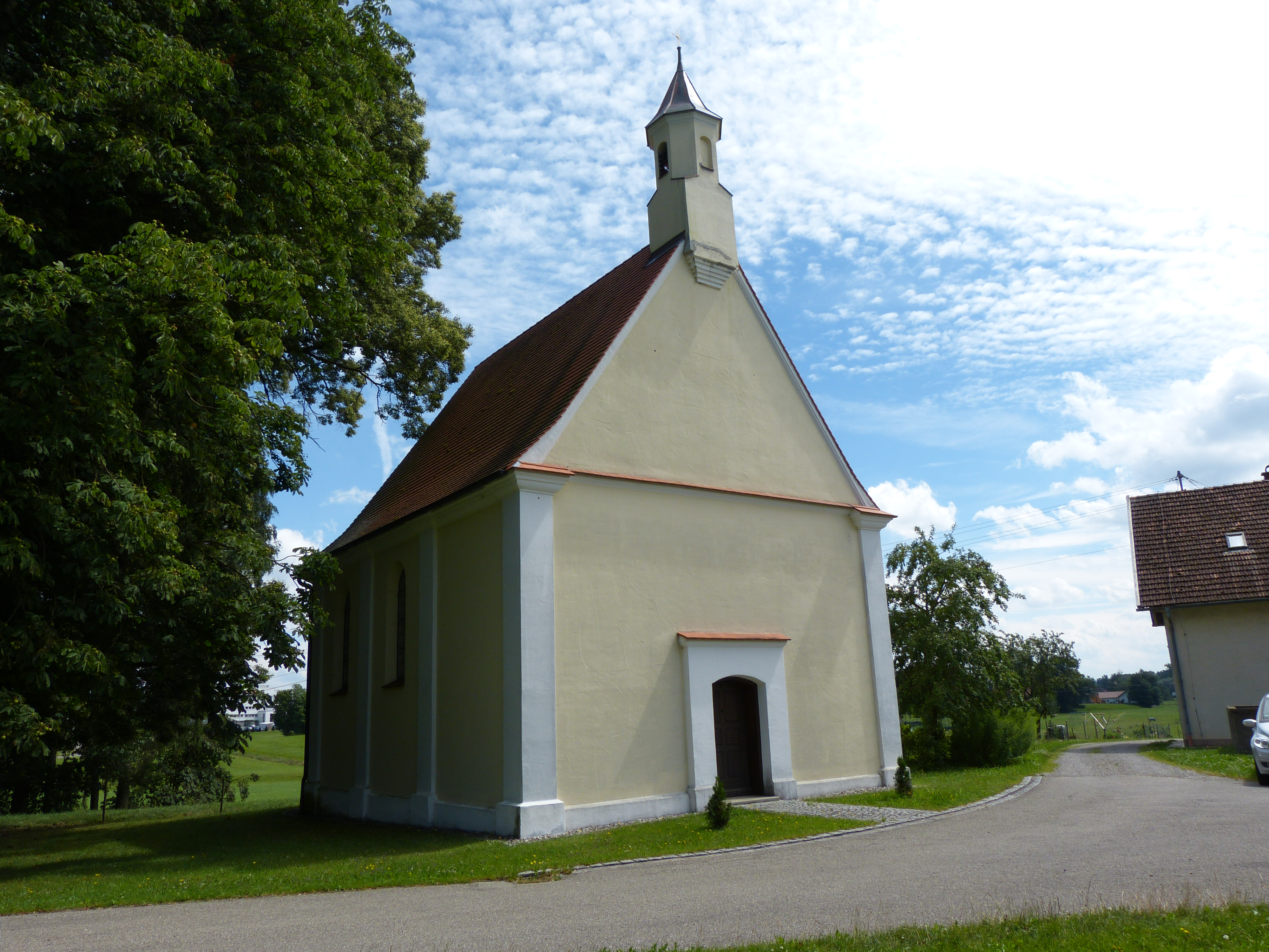 Kapelle St. Sebastian, Sankt Sebastian, Landkreis Unterallgäu, Bayern